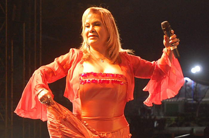 Palmenia Pizarro (San Felipe, Valparaíso, Chile, 19 de julio de 1941), es una cantante chilena. En la comuna de Maipú miles de personas festejan el Bicentenario de nuestra patria con numerosos artistas, bailes y colores durante la 4ta Semana Chilenidad.